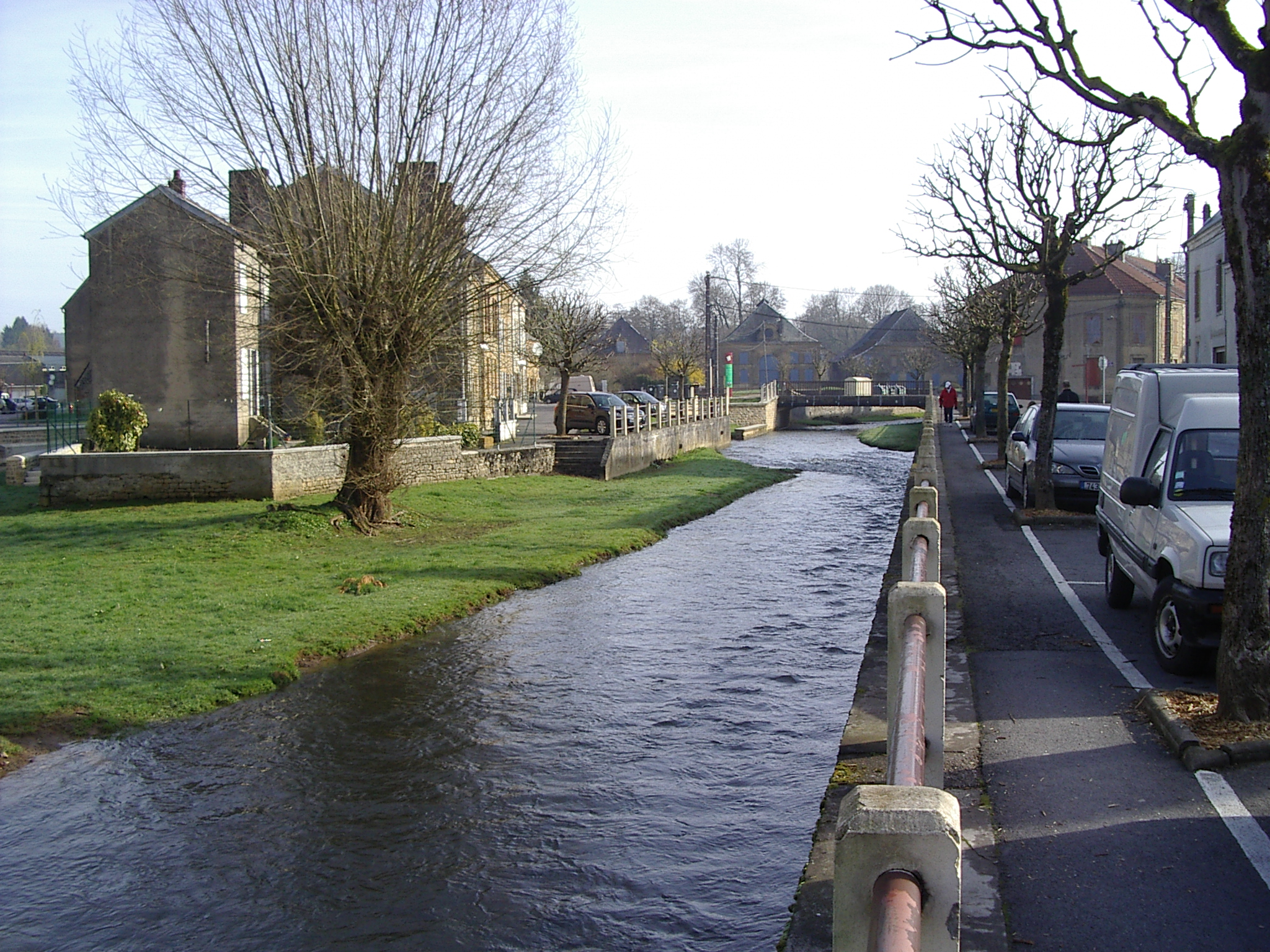 La Vrigne Rivière à Vrigne-aux-Bois- Ardennes- France